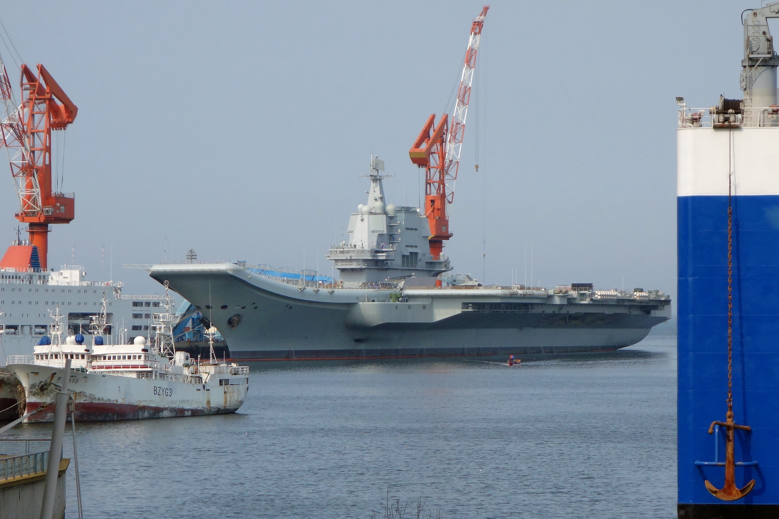 正在建造中的中国海军航空母舰。